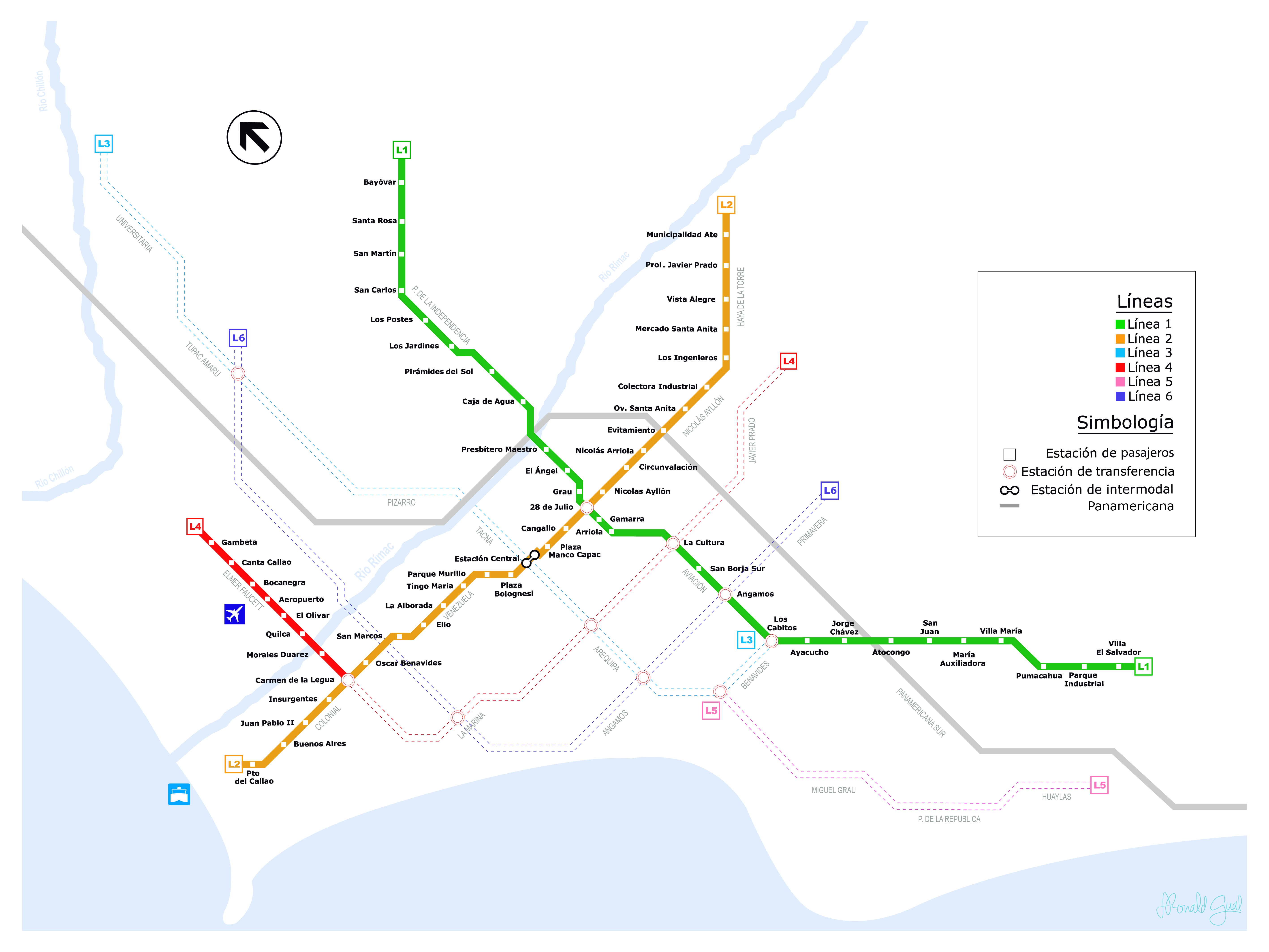 mapa de las lineas 1 (en funcionamiento) y 2 (en construcción)